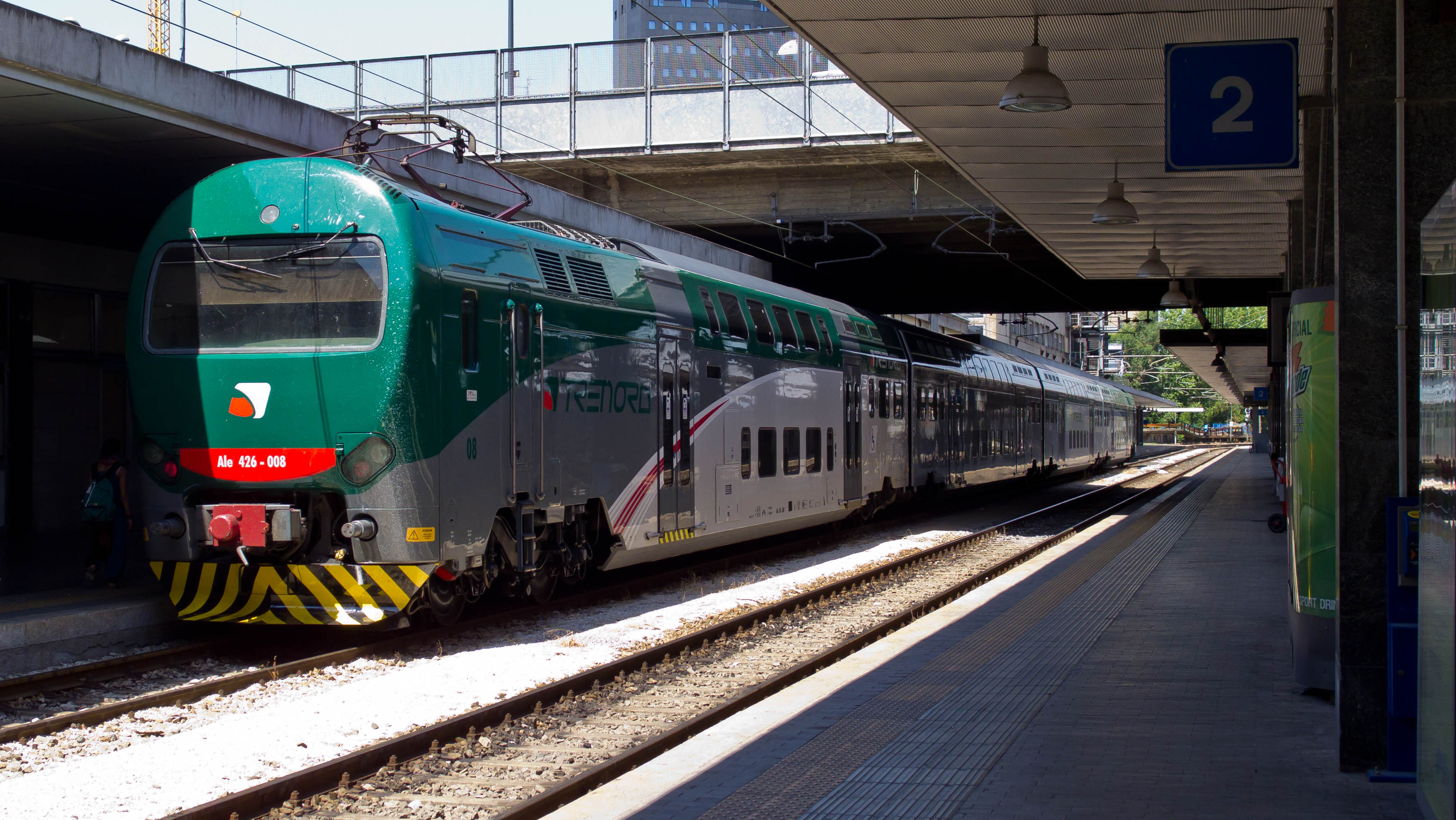 Stazione ferroviaria di Milano Porta Garibaldi. In sosta un elettrotreno TAF in livrea Trenord